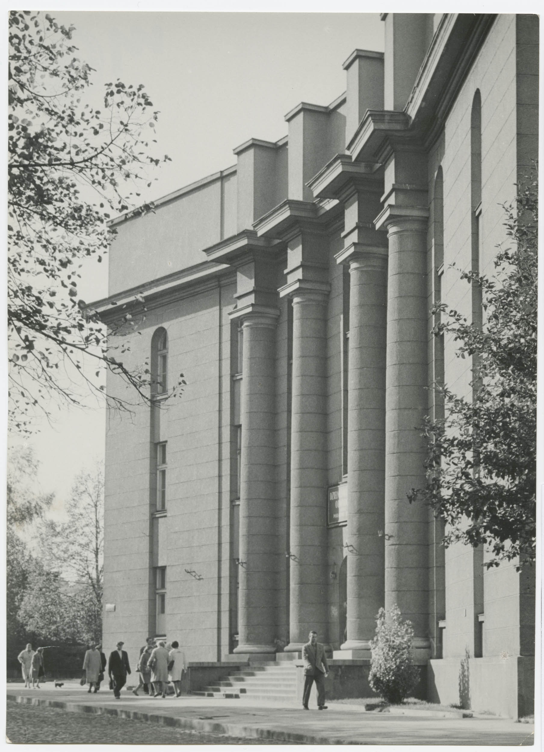 Fotografia przedstawia wejście do przychodni lekarskiej znajdującej się przy ulicy Leczniczej. Gmach został wybudowany w latach 1927-1930 w stylu modernistycznym według projektu Stefana Kraskowskiego. Powstał na planie litery "A", gdzie między ramionami tworzącymi dwa skrzydła znajdują się dwa dziedzińce: wewnętrzny i zewnętrzny. Budynek zbudowano na potrzeby wielospecjalistycznej przychodni należącej do Kasy Chorych Miasta Łodzi. W 1930 roku na mocy dekretu Prezydenta RP, który zlikwidował regionalne kasy chorych, przychodnia przeszła pod zarząd Zakładu Ubezpieczeń Społecznych. Podczas II wojny światowej w budynku mieścił się szpital niemiecki. Na początku lat 70. XX wieku obiekt został wpisany do rejestru zabytków. W latach 2001-2003 w gmachu przeprowadzono generalny remont.